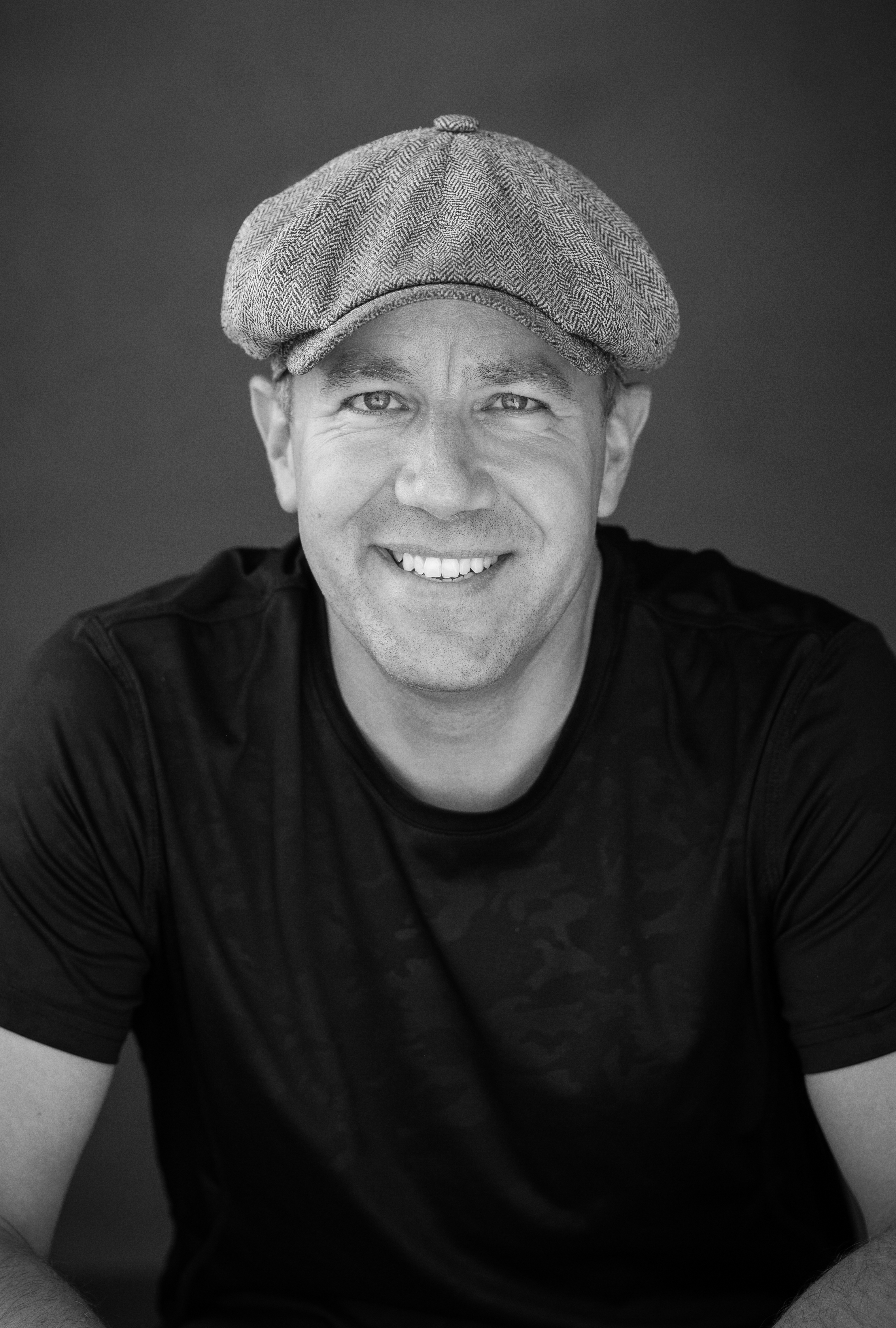 Thomas Leuthard (July 2019)